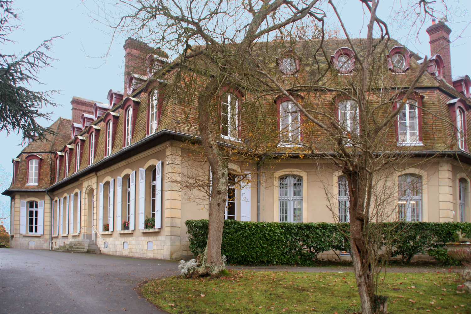 monastère de l'Annonciade sur la colline Saint-Laurent